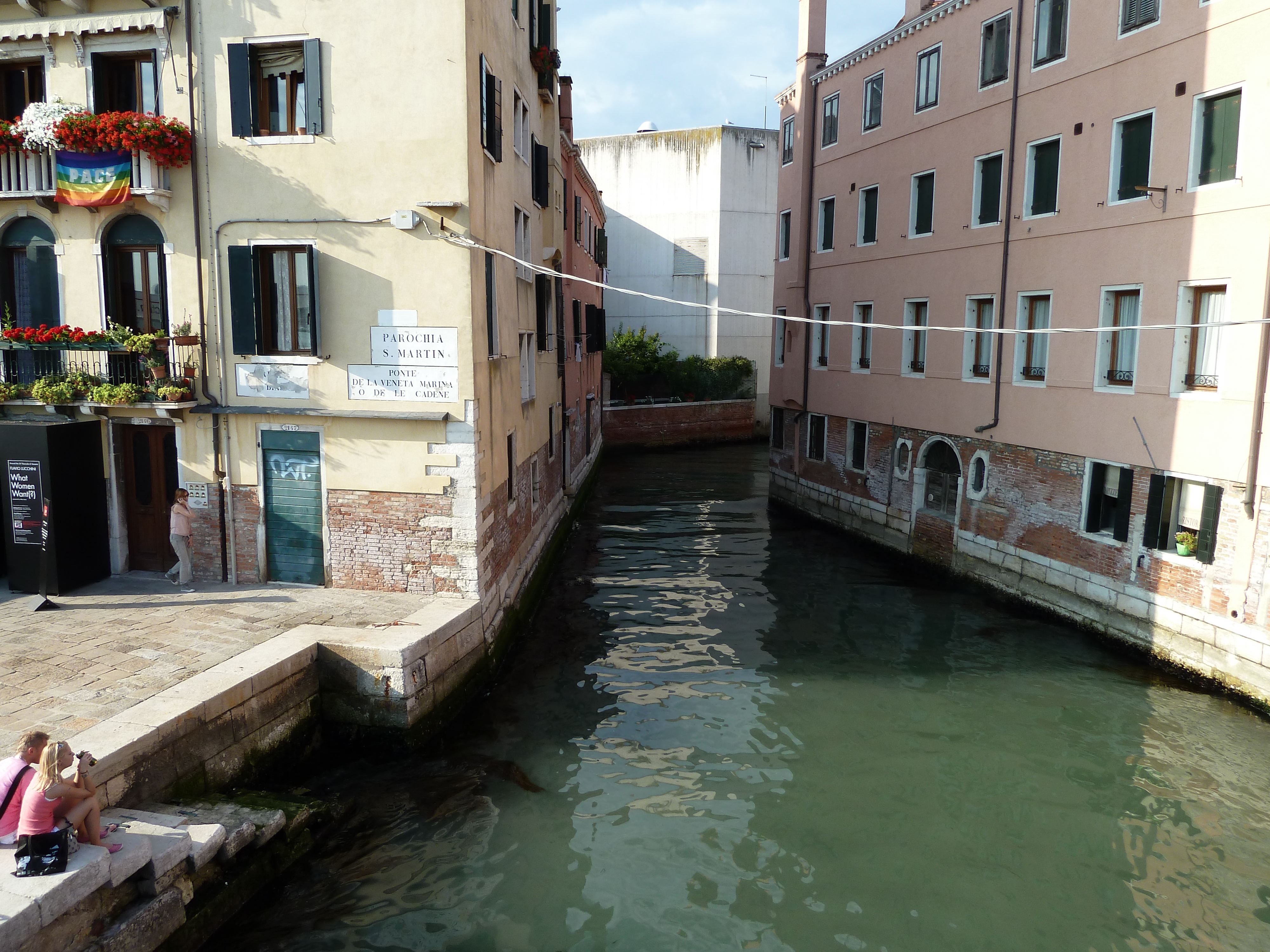 Rio della Tana (Venice)